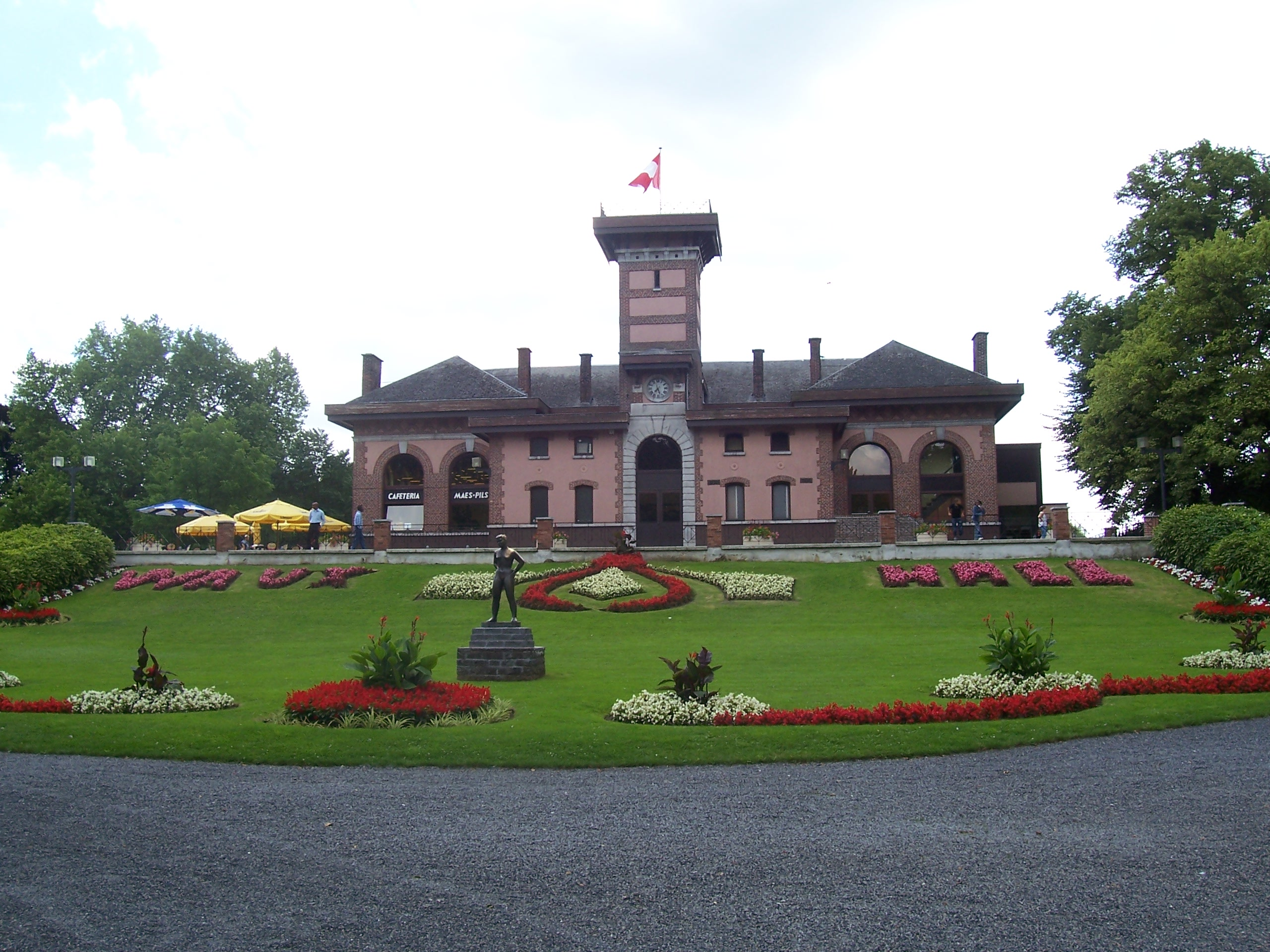 Waux-Hall, Mons, Belgique